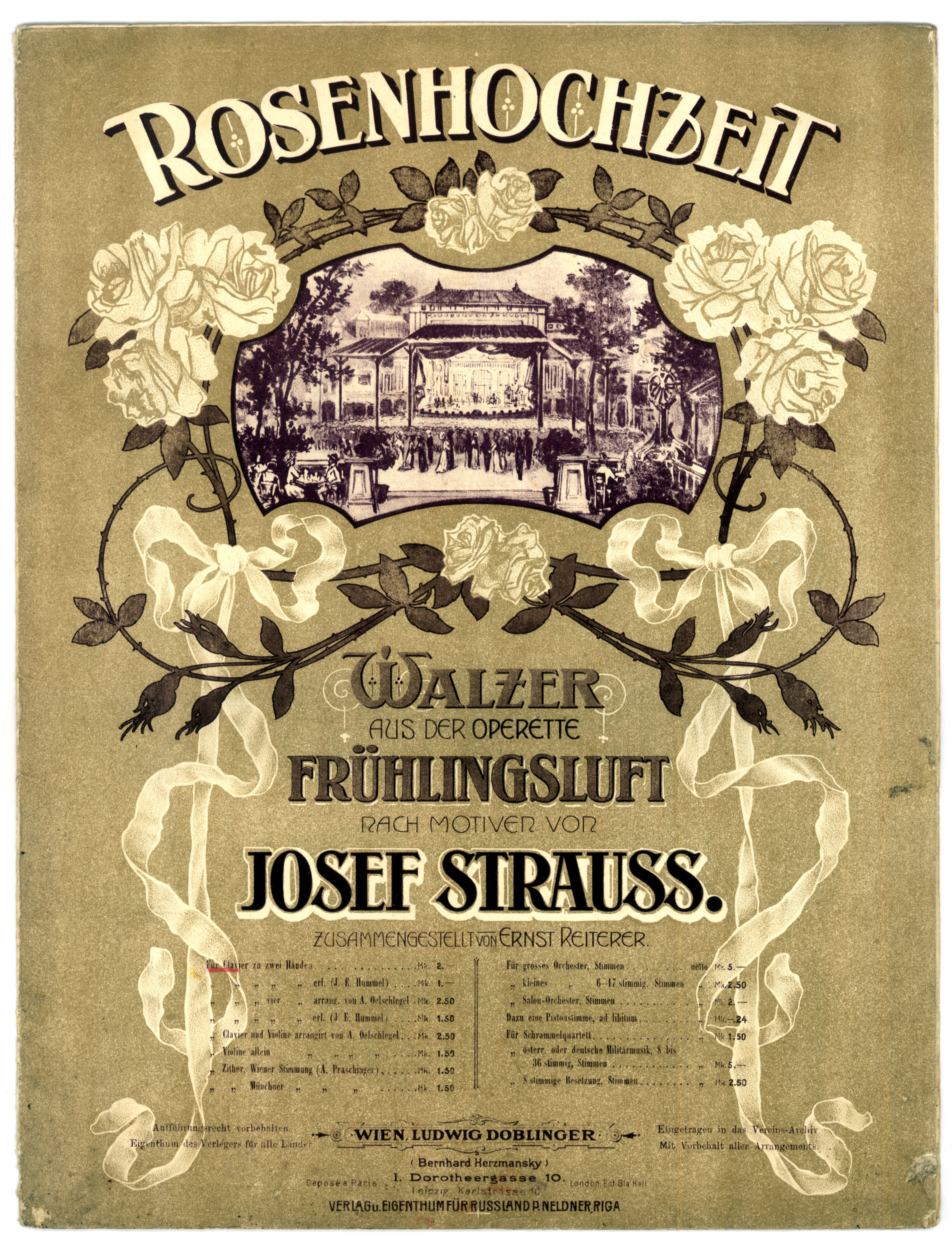 Ernst Reiterer (1851-1923), Rosenhochzeit, sheet of music